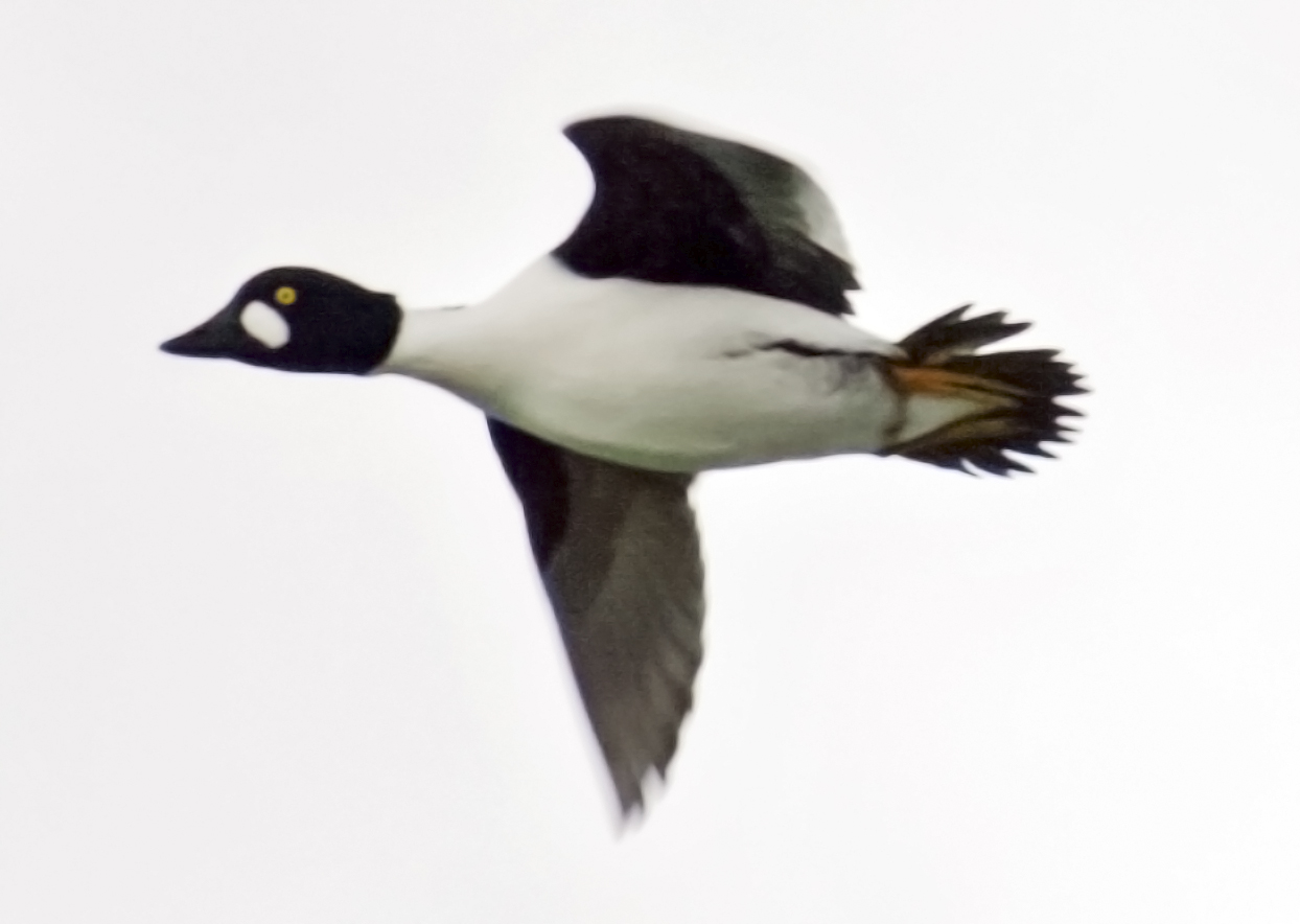 Flying bucephala clangula (Texel, NL